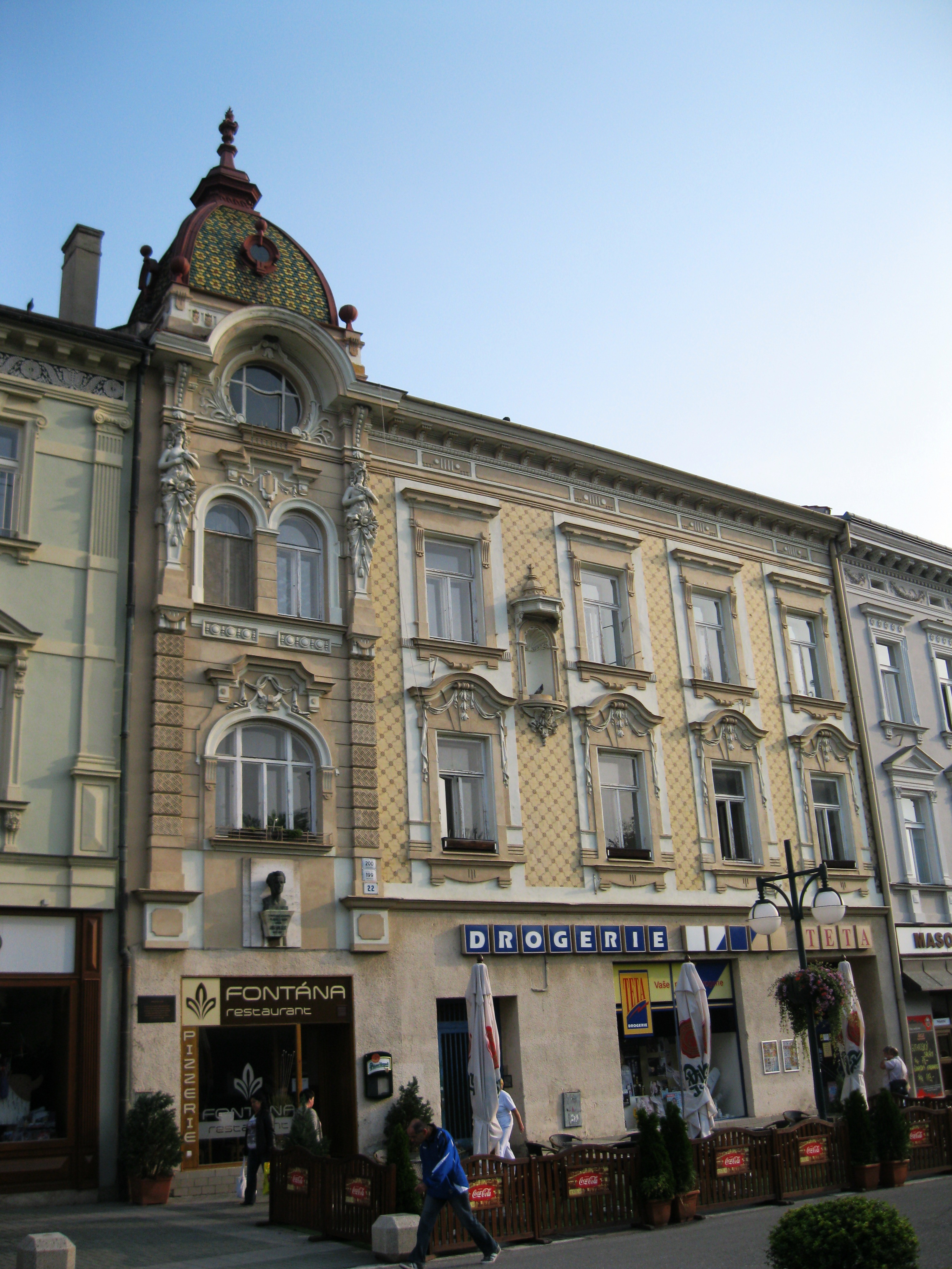 Městský dům, s omezením: bez dvorního křídla na parc. č. 268/4 včetně pozemku (Prostějov), nám. T. G. Masaryka, Školní 199/22, Prostějov